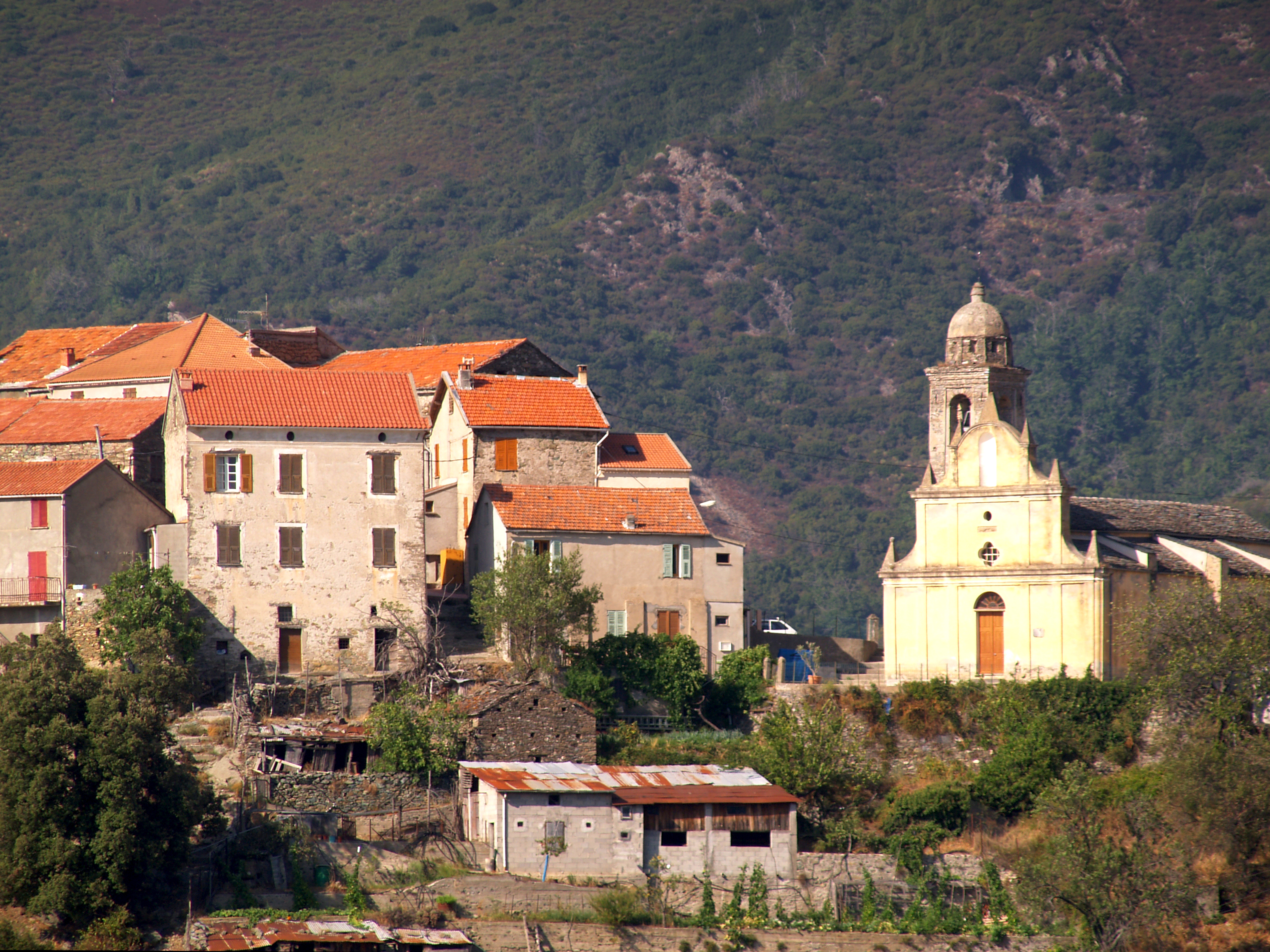 Focicchia, Bozzio (Haute-Corse) - Église San Baggio (Saint-Blaise)